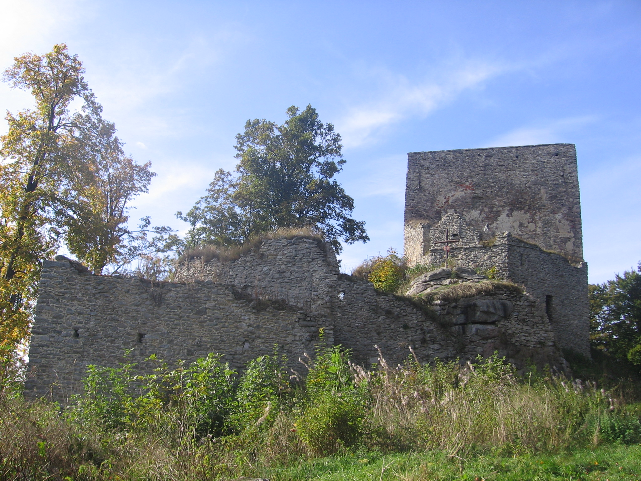 Vítkův kámen, v hraničním pásmu, Svatý Tomáš (Přední Výtoň).